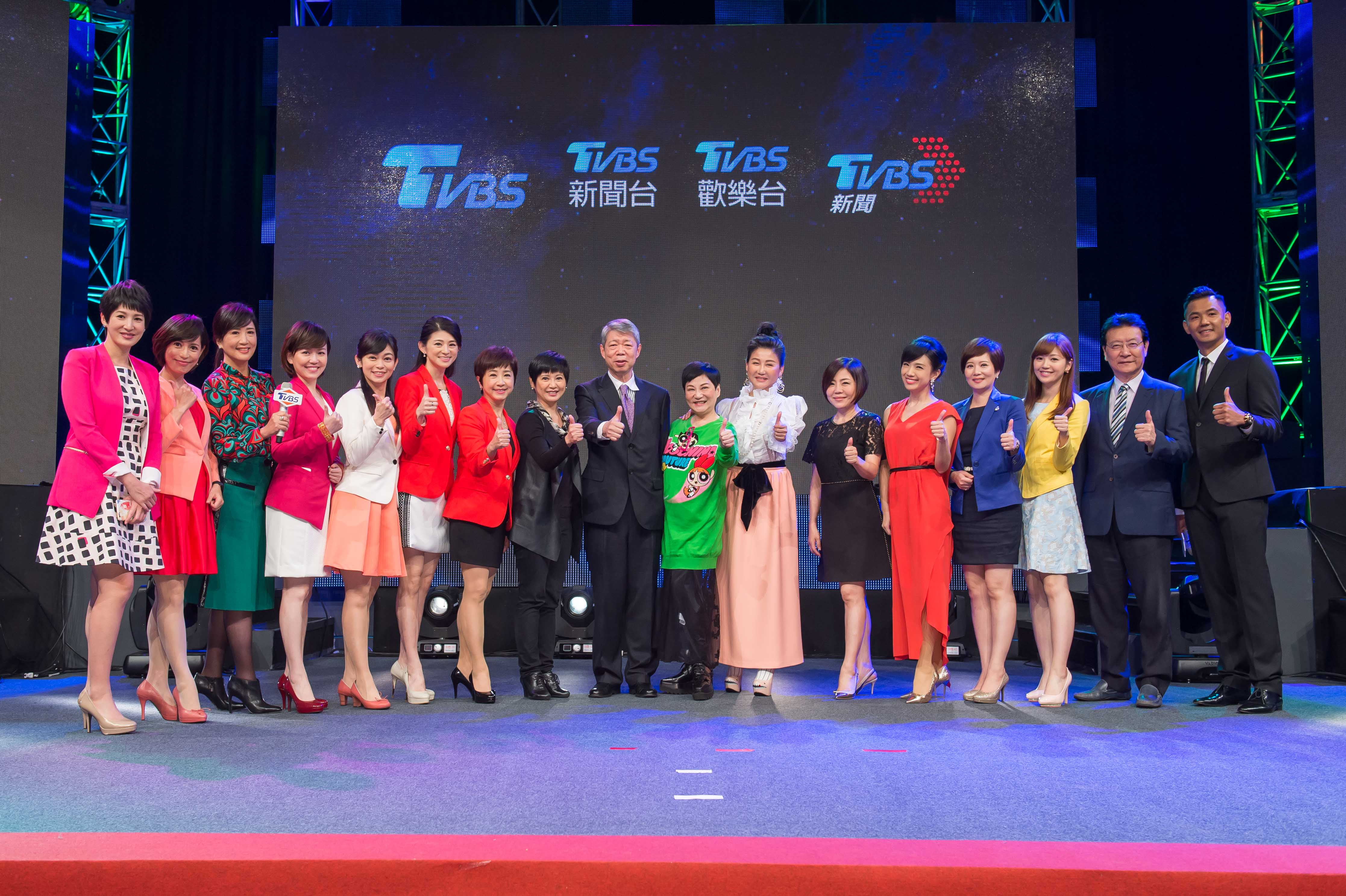 2016年12月21日，TVBS啟用第二代商標，取代使用了23年的第一代商標。TVBS董事長張孝威與演藝圈大姊大張小燕、TVBS名主持人趙少康、藍心湄、于美人、TVBS新聞總監詹怡宜、及TVBS主播群，共同出席宣傳記者會。